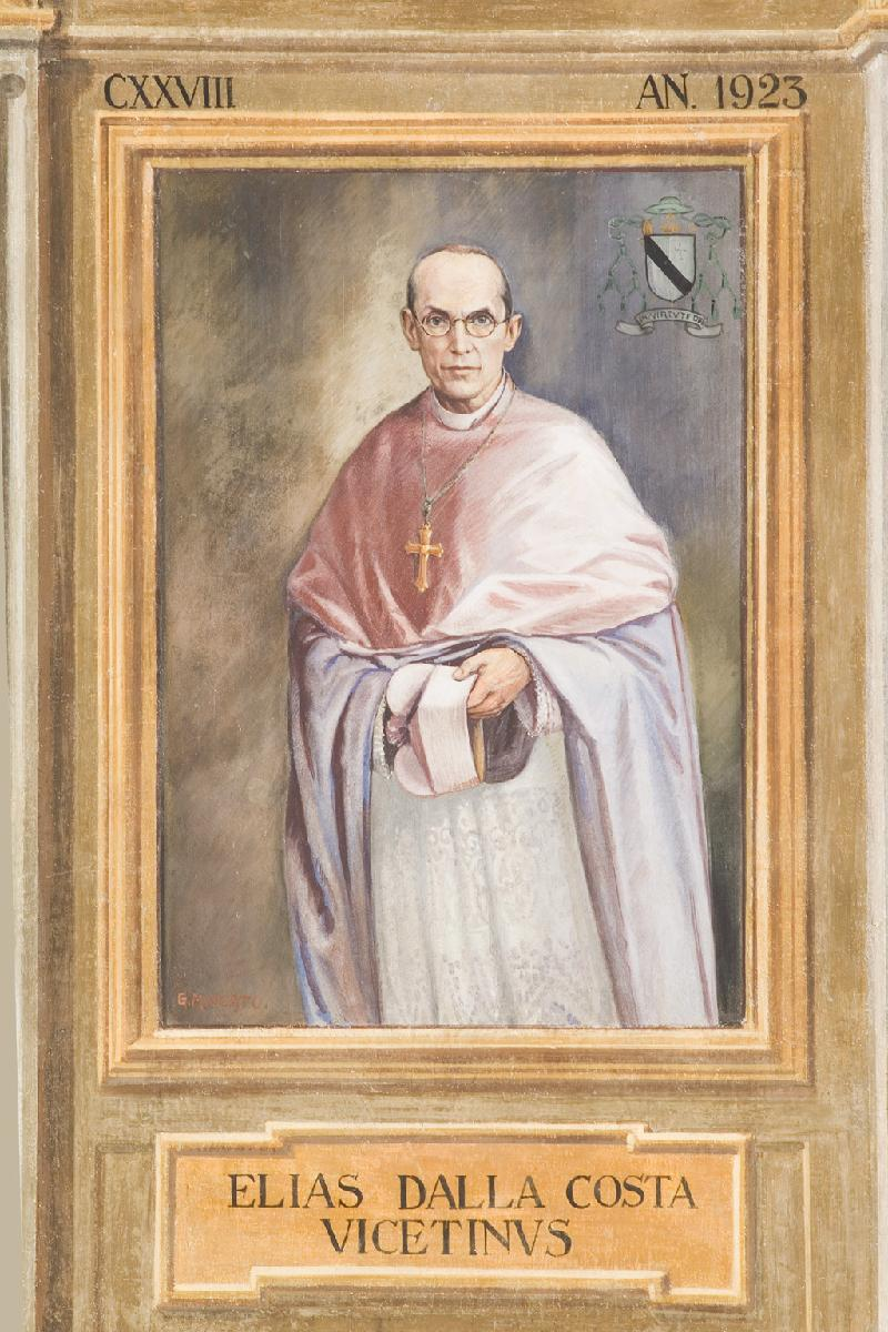 Elia Dalla Costa - Palazzo Vescovile - Padova